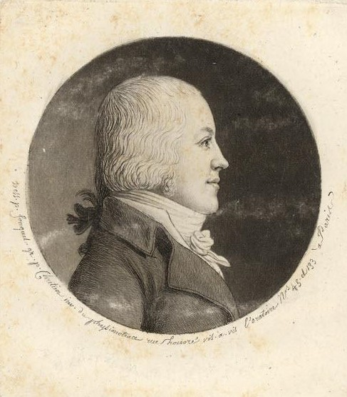 Bildnis Gottlieb Abraham von Jenner (1765-1834).